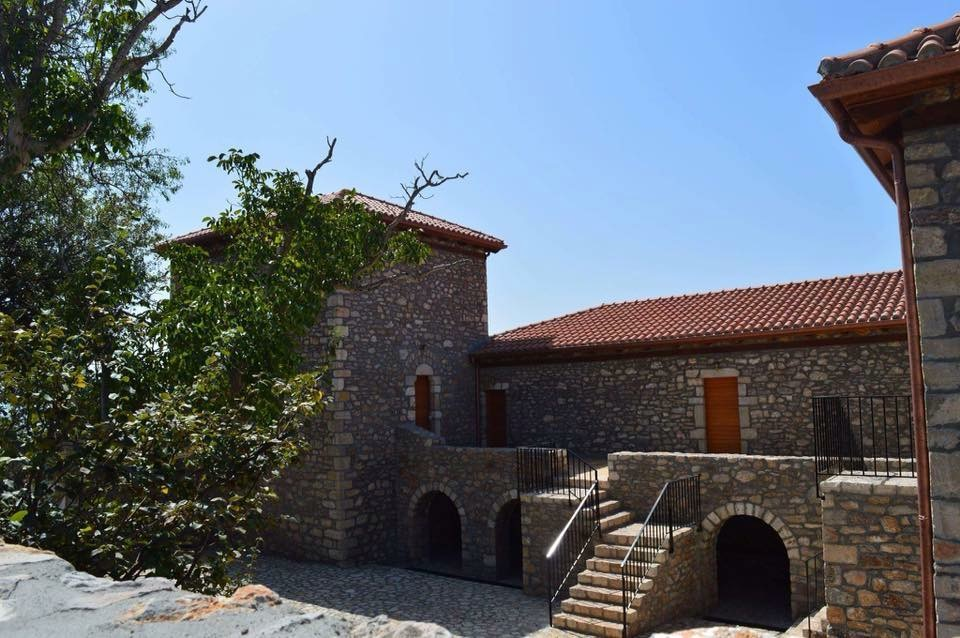 Plapoutas Tower Αδειοδότηση Το παραπάνω αρχείο διανέμεται υπό τις δύο παρακάτω άδειες χρήσης. Μπορείτε να επιλέξετε την άδεια της προτίμησής σας.